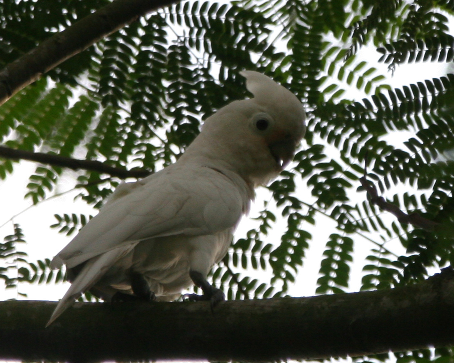 Tanimbar Corella, Singapore (feral)